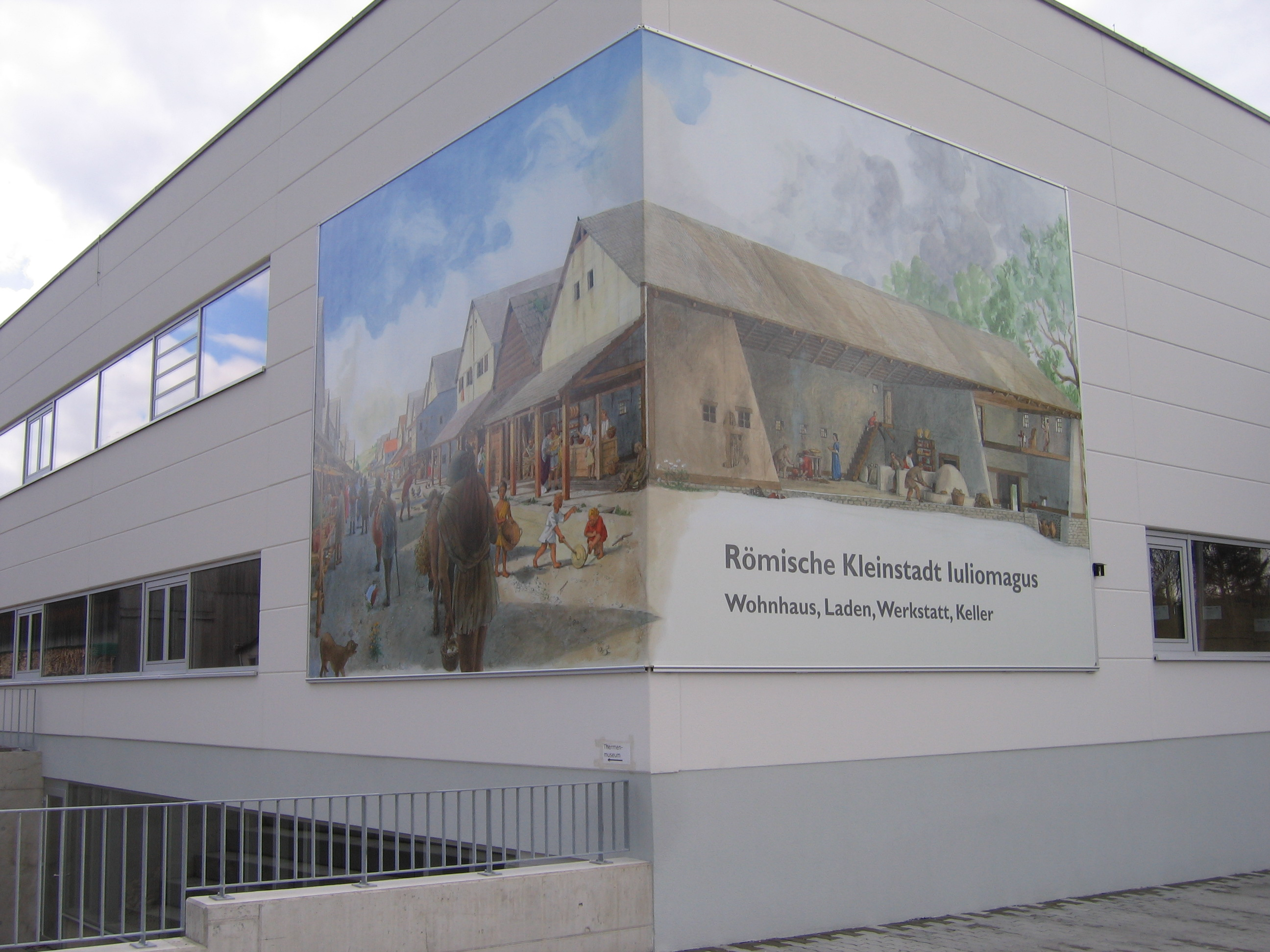 Gewerbehalle in Schleitheim (Schweiz) mit Rekonstruktionszeichnung zur römischen Ausgrabung im Jahr 2000. Eine von aussen sichtbare Fundstelle ist im Untergeschoss eingerichtet.